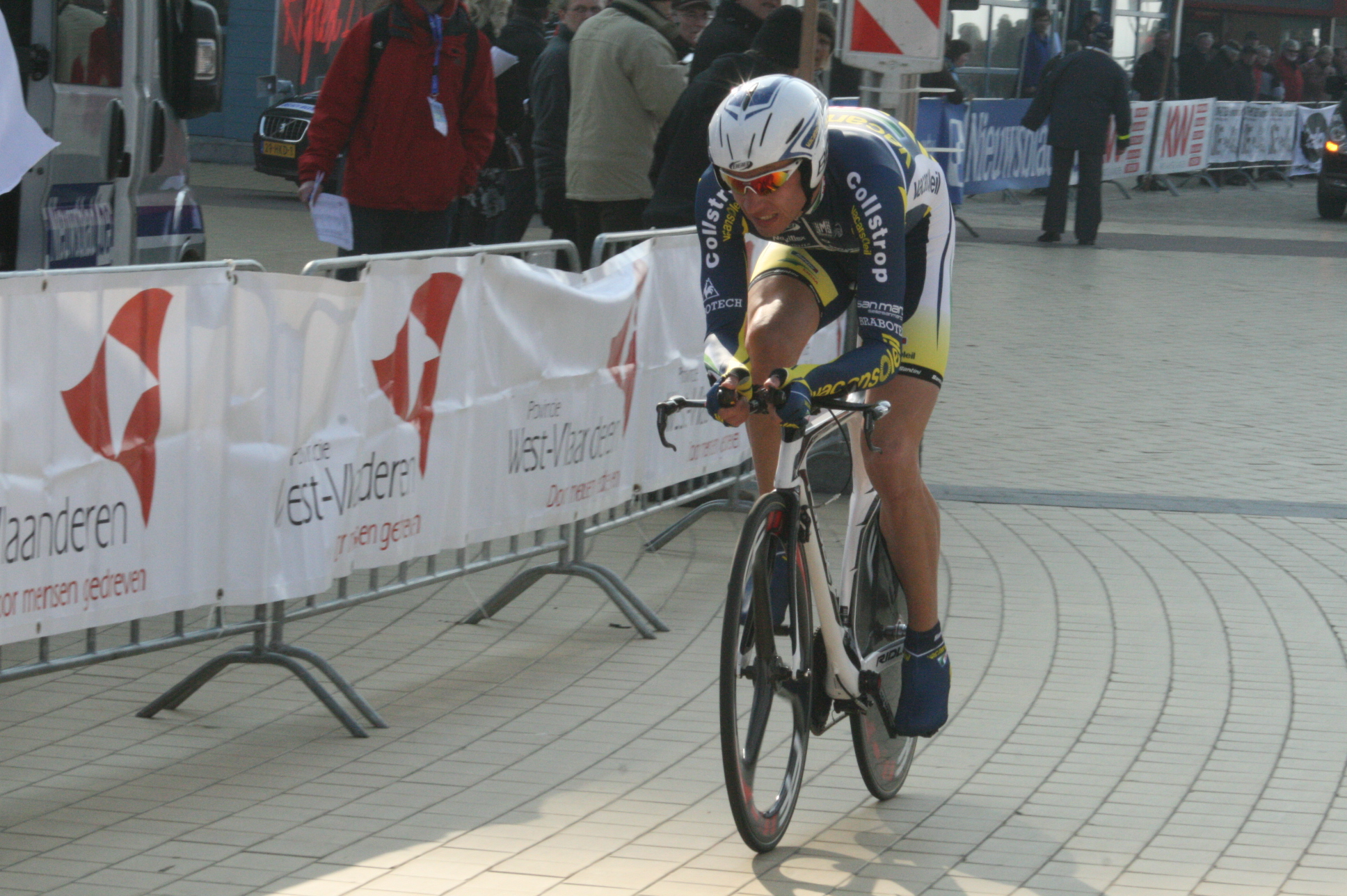 Driedaagse van West-Vlaanderen 2011, proloog in Middelkerke